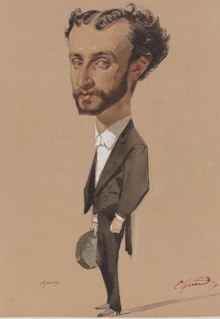 Placido Gabrielli in una caricatura di Pierre-Francois-Eugene Giraud (1806-1881) Dalla serie: Les Soiress du Louvre, 1864